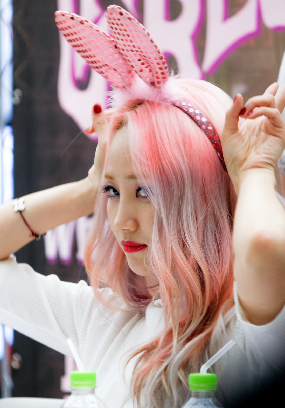 Yenny at a fanmeet on July 15, 2016.